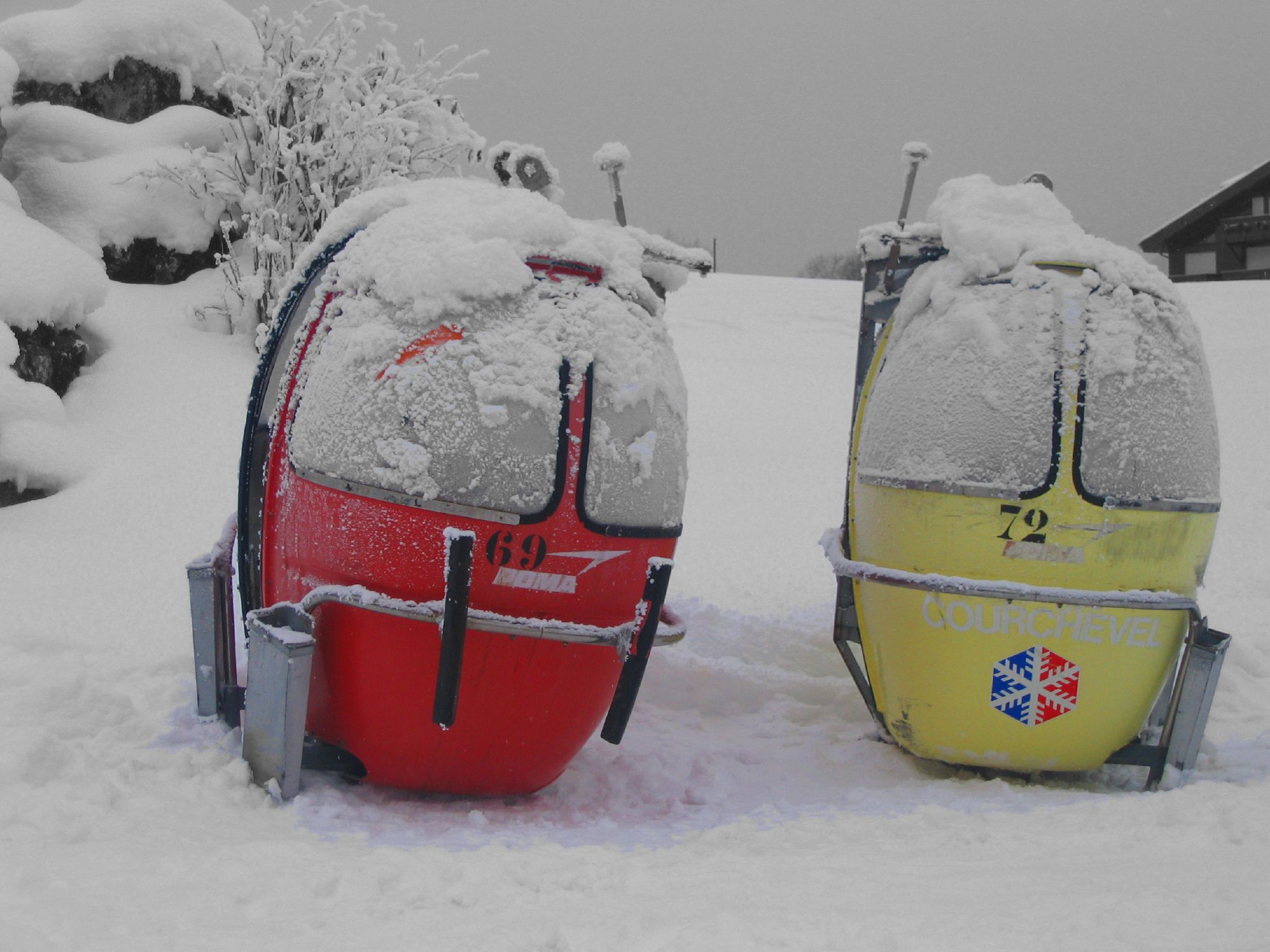 Retired gondolas, Le Praz